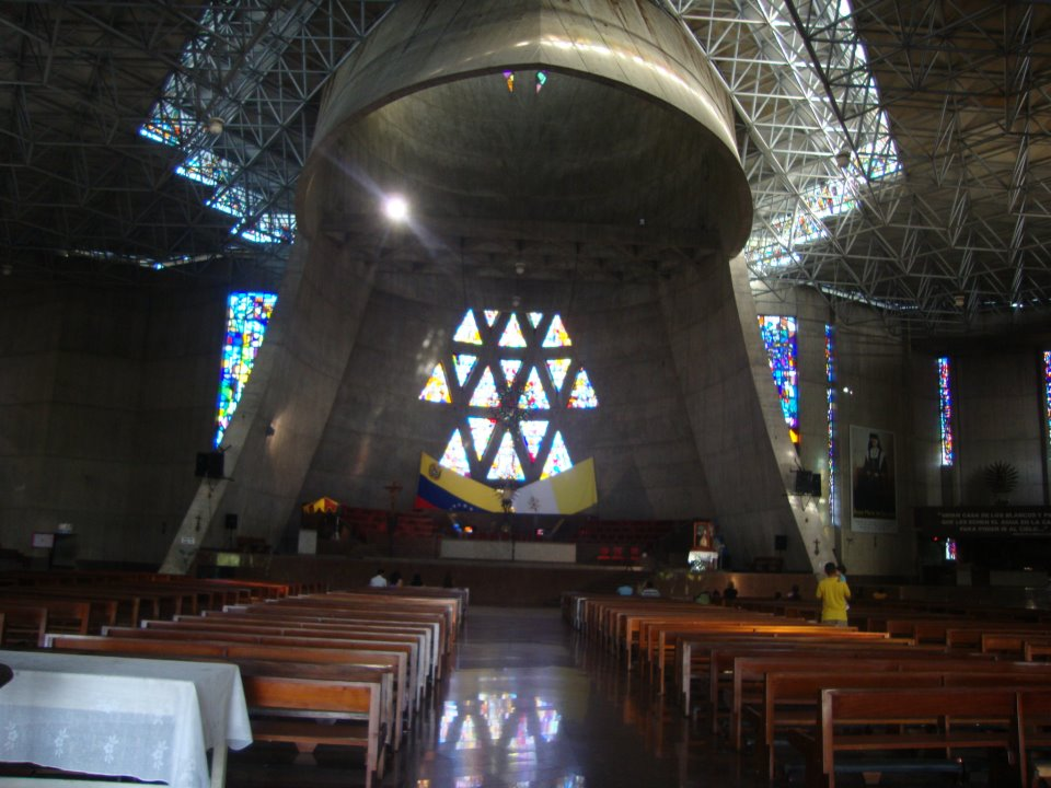 Templo Votivo de la Virgen de Coromoto, estado Portuguesa - Venezuela 2012